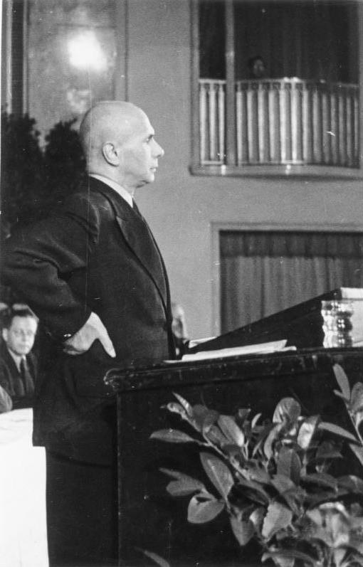 Berlin, CDU- Parteitag, Jakob Kaiser Zentralbild Berlin: 6.-8.September 1947 Jakob Kaiser auf dem CDU-Parteitag der CDU Berlins und der Ostzone Abgebildete Personen: Kaiser, Jakob: Bundesminister für gesamtdeutsche Fragen, CDU, Bundesrepublik Deutschland (GND 11855946X)